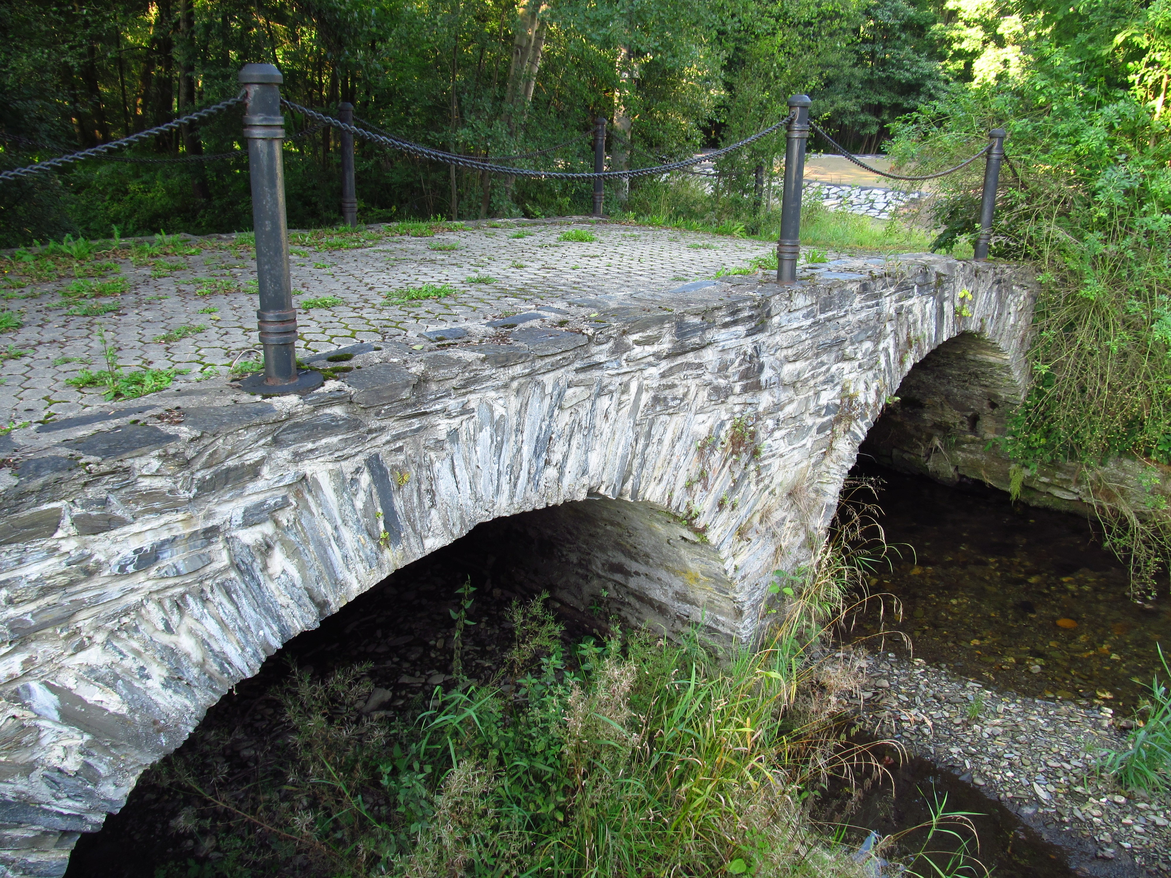 Silniční most, přes řeku Moravici, Dolní Moravice.